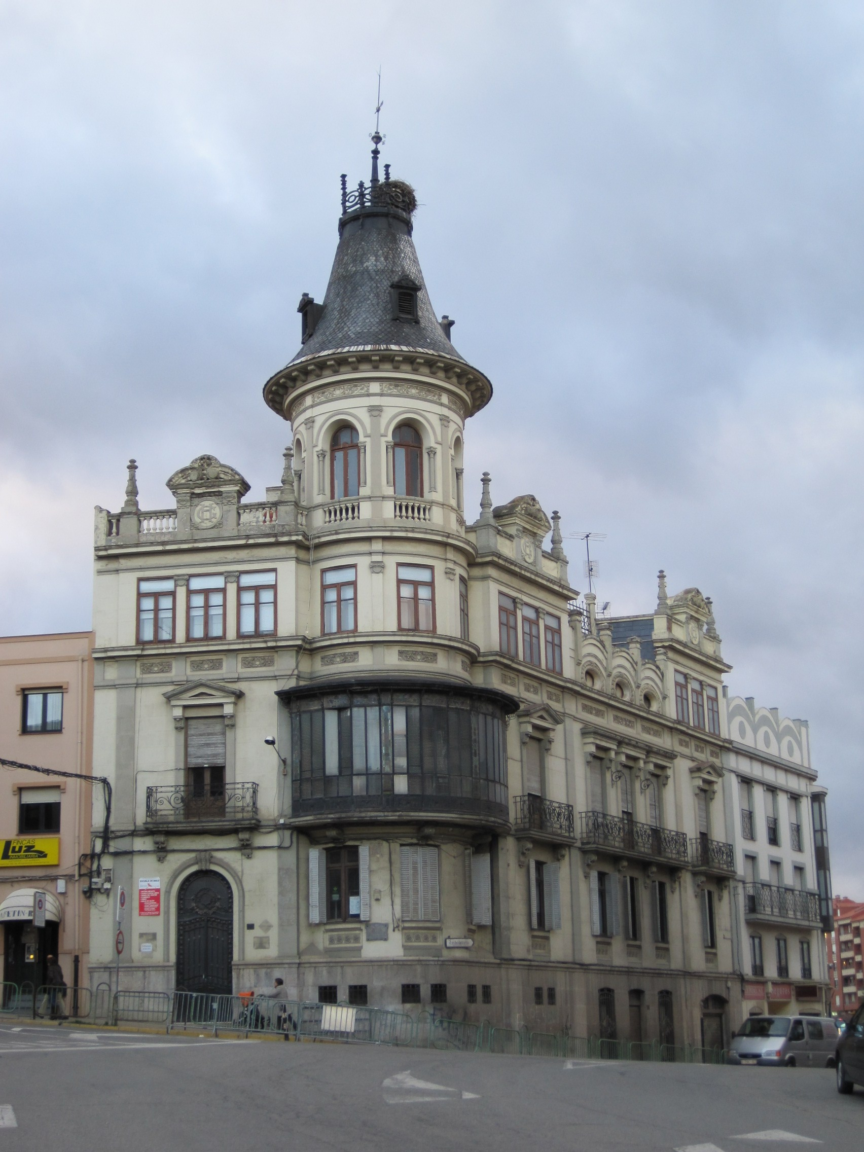 Casa Granell, Astorga (provincia de León, Castilla y León, España).